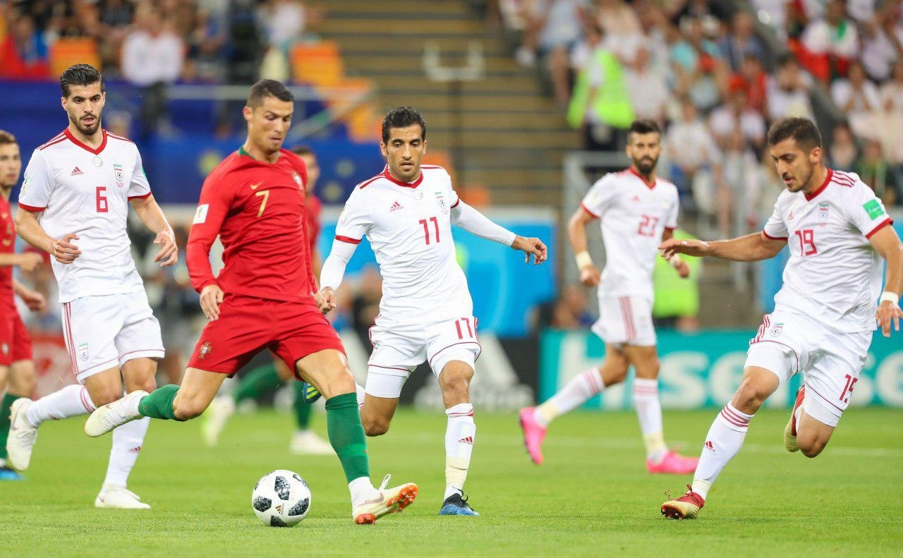 نیمه نخست بازی تیم‌های فوتبال ایران و پرتغال در جام جهانی ۲۰۱۸